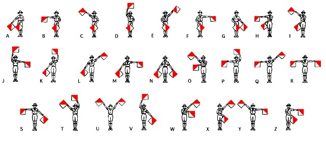 Tabelarni prikaz slova u semaforskoj signalizaciji